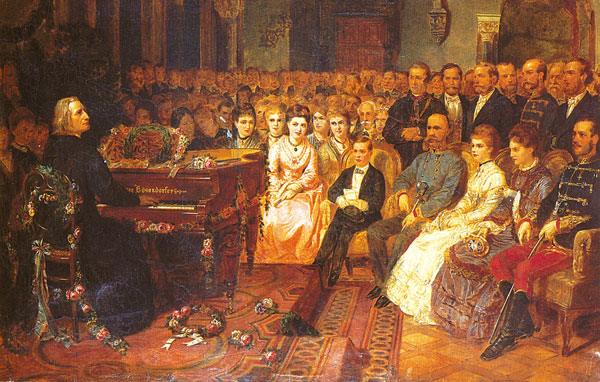 Franz Liszt gibt ein Konzert für Kaiser Franz Joseph I. (vierter von rechts sitzend in hellblauer Uniform) auf einem Bösendorfer Flügel